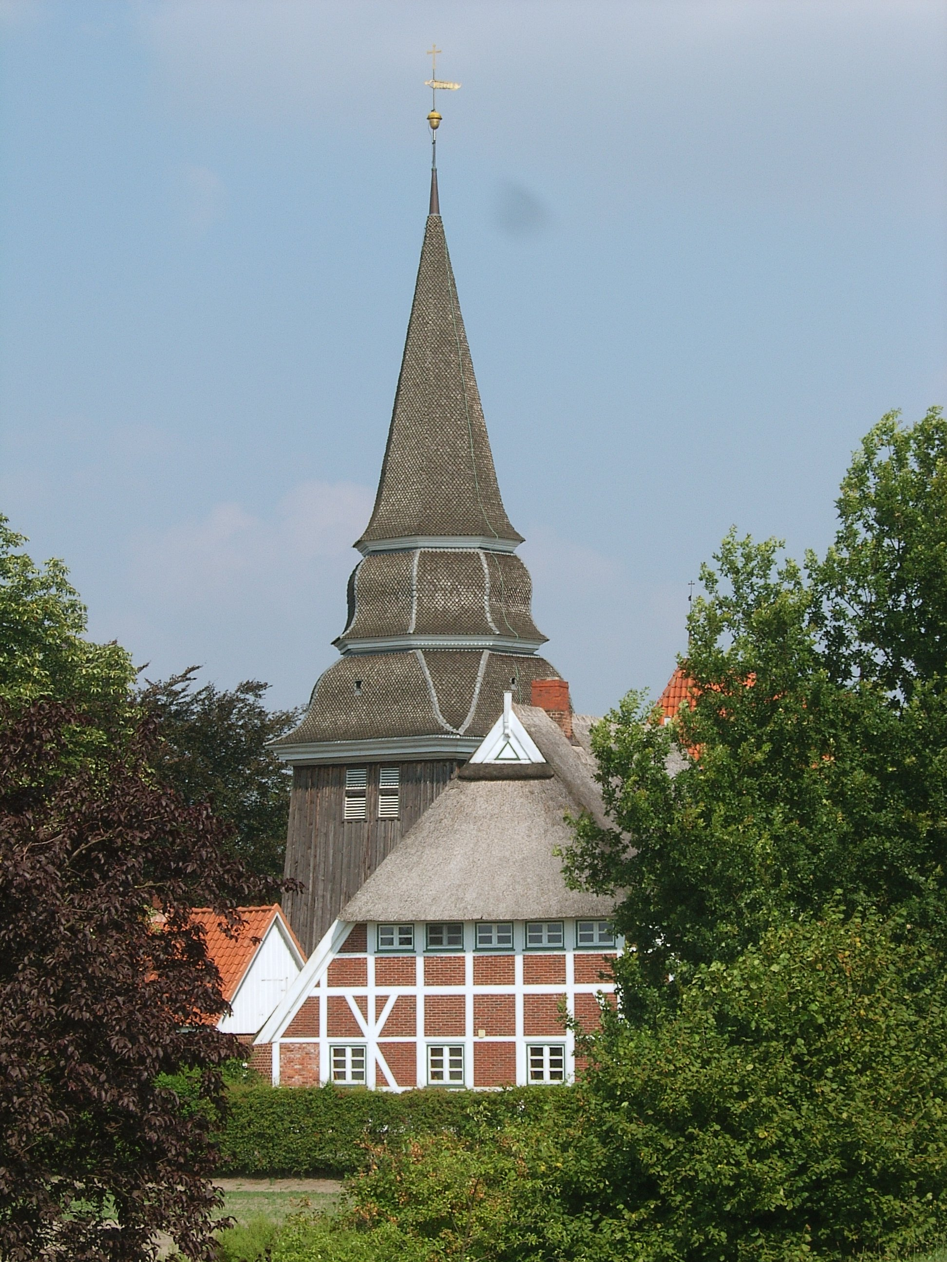 Hamburg, Curslack, Kirche St.Johannis, Turm